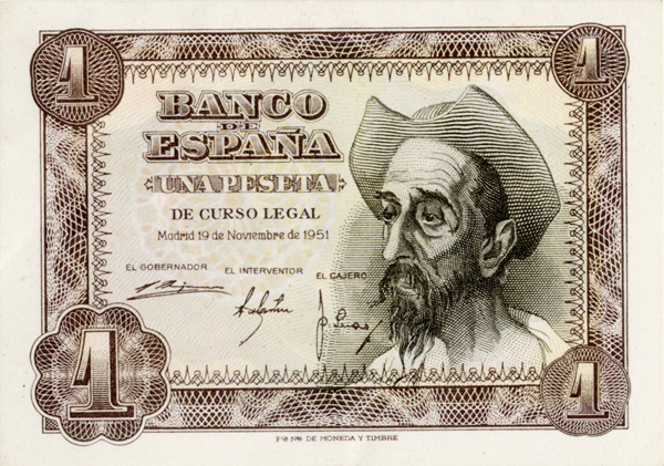 Billete de 1 peseta (Anverso). Banco de España. Madrid, 19 de noviembre de 1951. Luis Gasca Collection.